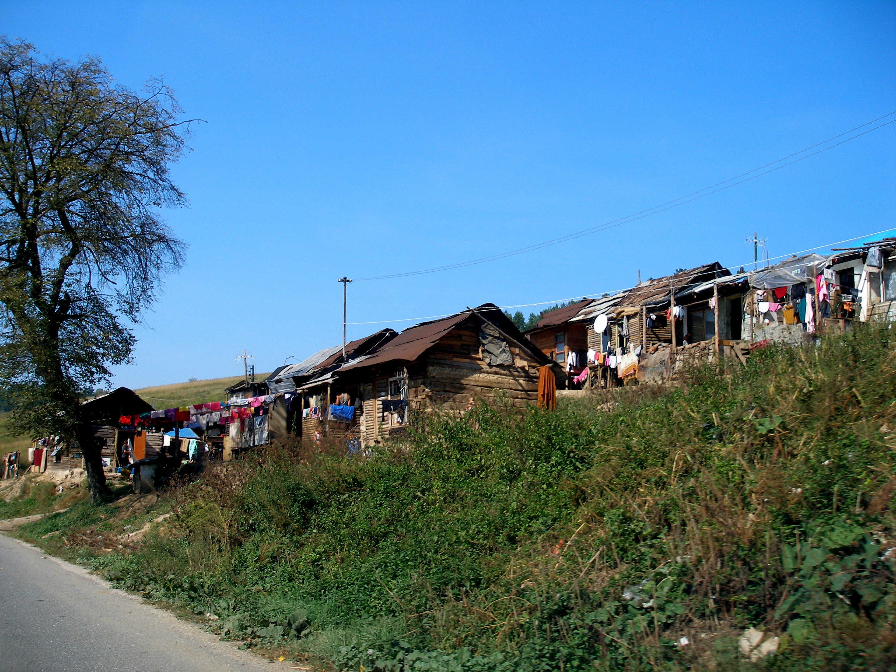 Rómske sídlisko, kataster obec Žehra, okres Spišská Nová Ves..